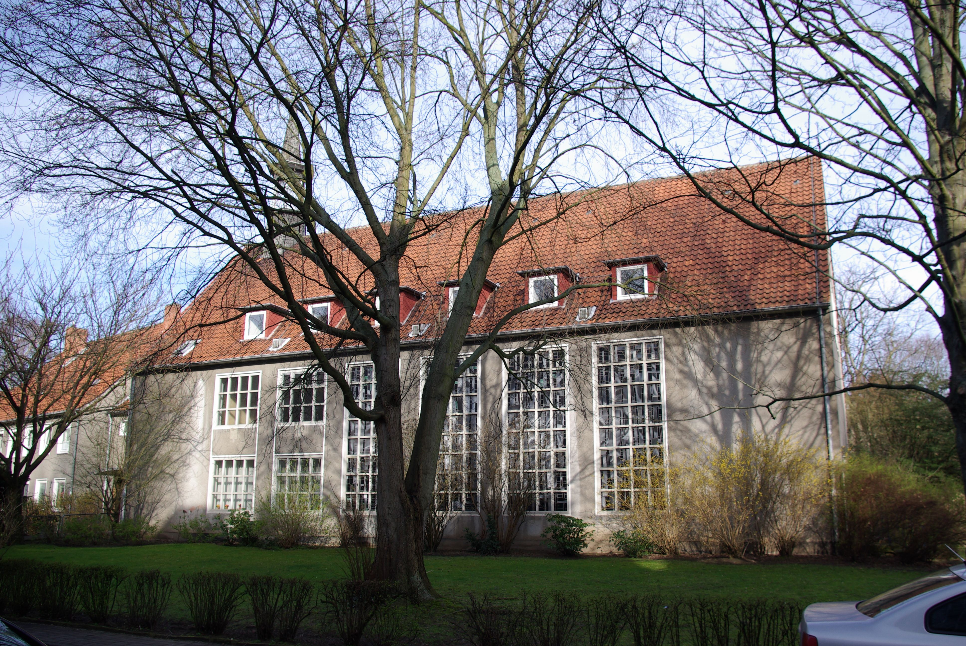 Hannover, Stadtteil Ricklingen, die Kirche der Gemeinde Maria Magdalenen, nach Umbau am 13. Juni 2013 als Synagoge der Jüdischen Bucharischen Gemeinde Hannovers eröffnet.